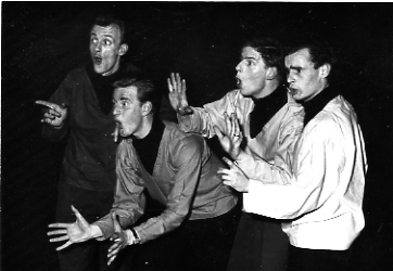 Van links naar rechts: Henny de Ruiter, Hans Gelderblom, Frits van de Jagt en Rinus Ferdinandusse. Zelfgemaakte foto uit circa 1960